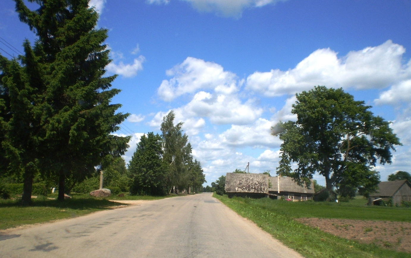 Okainiai, Kėdainių raj.